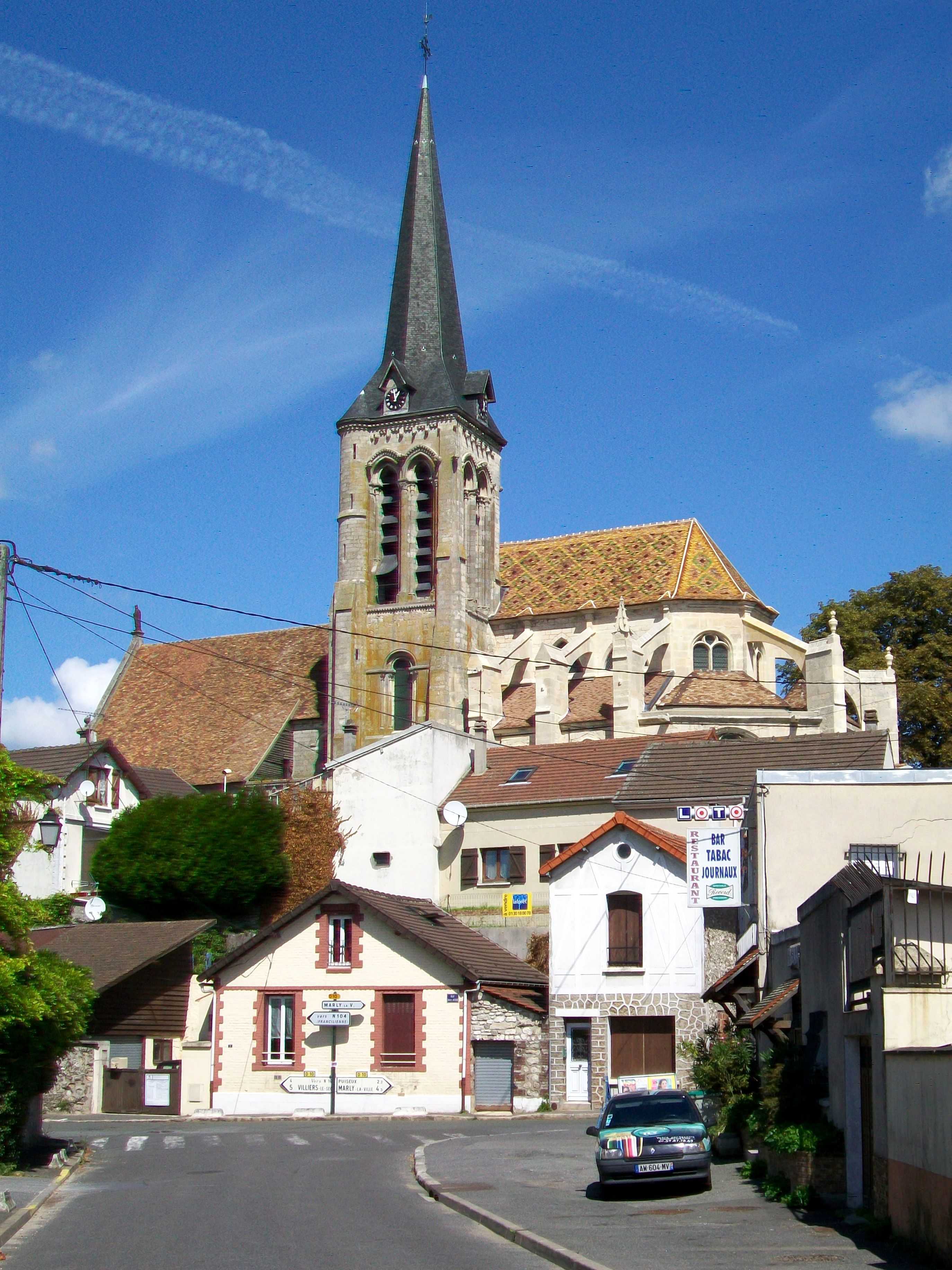 L'église Saint-Aquilin de Fontenay-en-Paris, façade sud, depuis la rue Maître Renault.